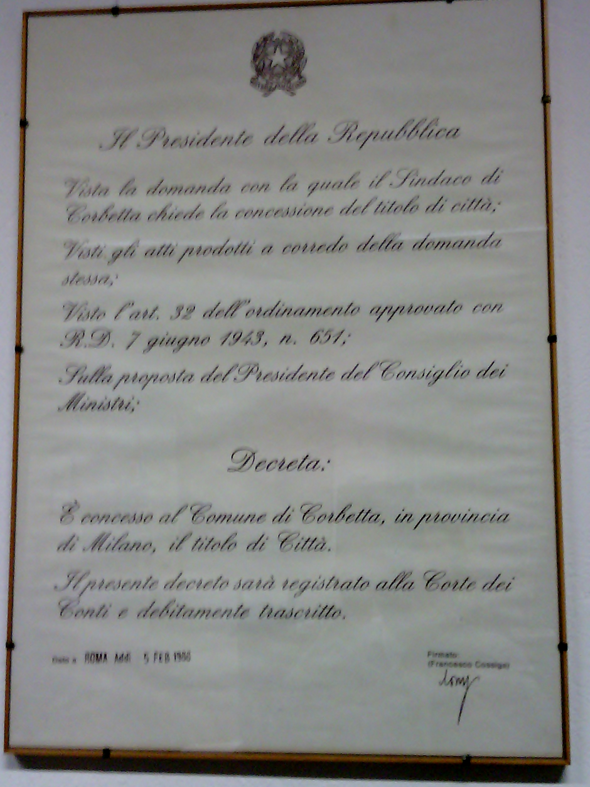 Copia del decreto di concessione del titolo di Città alla città di Corbetta (MI) - Italy